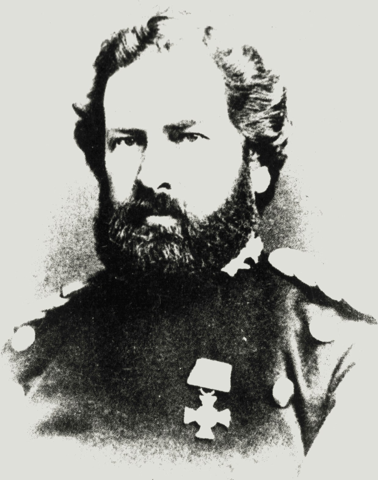 Scan eines alten Familien-Fotos